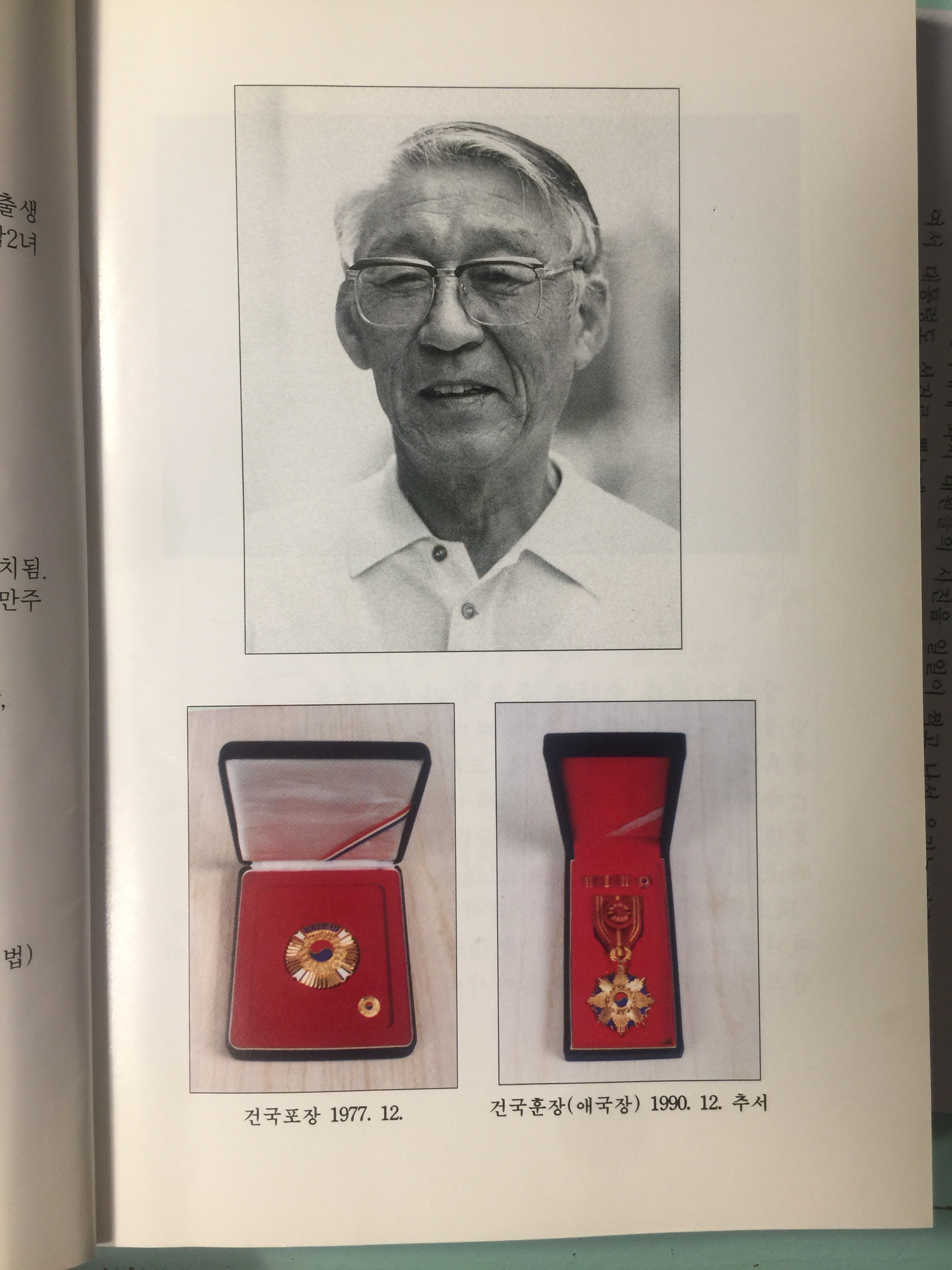 건국훈장 사진